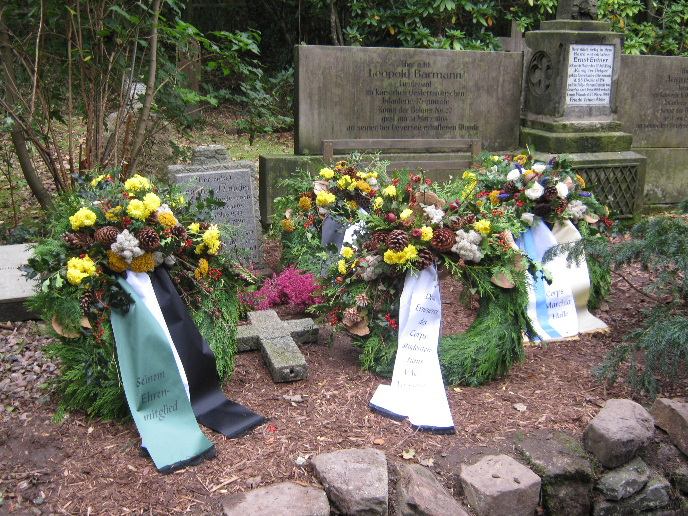 Trauerkränze auf Leonhard Zanders Grab auf dem Garnisonfriedhof in Schleswig